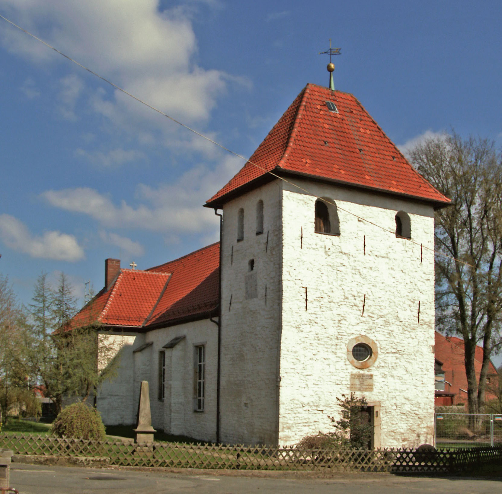 Evangelische Kirche in Bahrdorf, Landkreis Helmstedt.